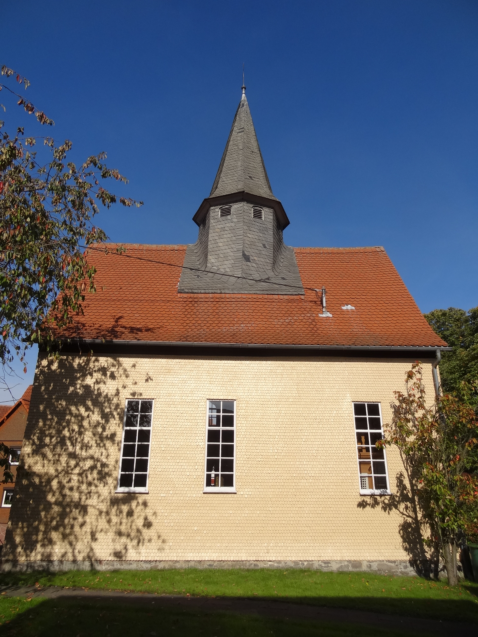 Evangelische Kirche Lardenbach